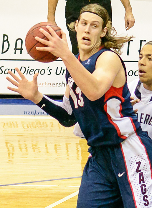 Gonzaga Bulldog Kelly Olynyk